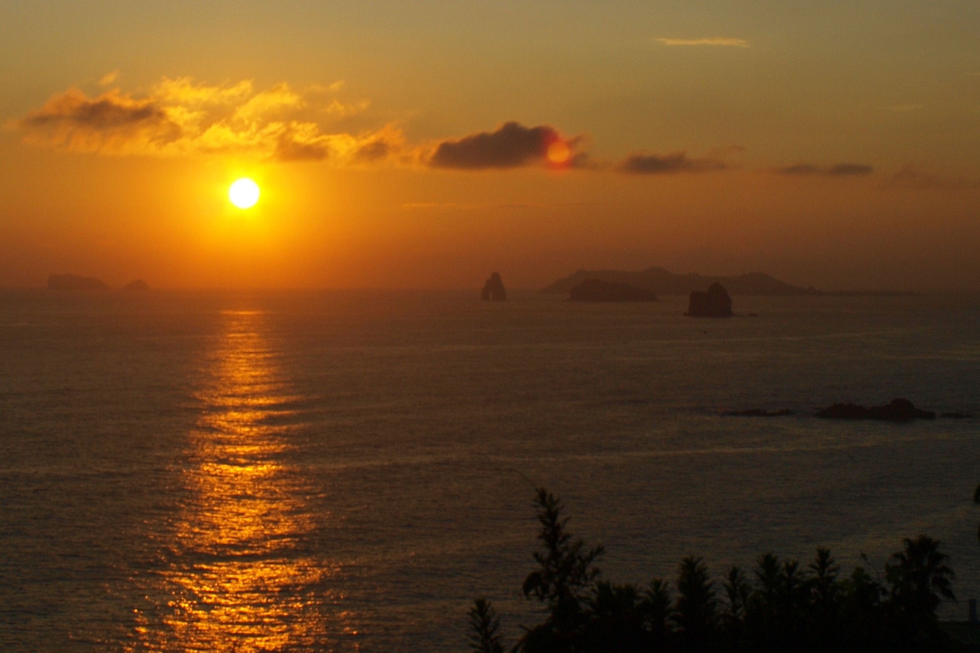 長崎市外海町の国道202号より角力灘（五島灘）の島々を望む